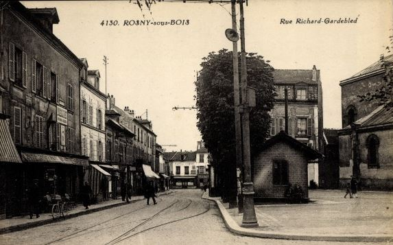 Rosny-sous-Bois.Rue Richard-Gardebled.Derrière l'église